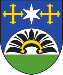 znak obce Kadolec, okres Žďár nad Sázavou